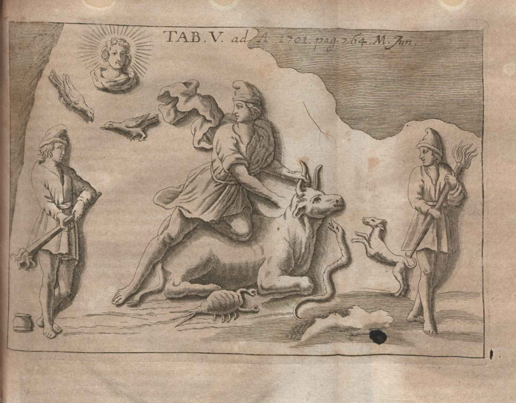 Illustration